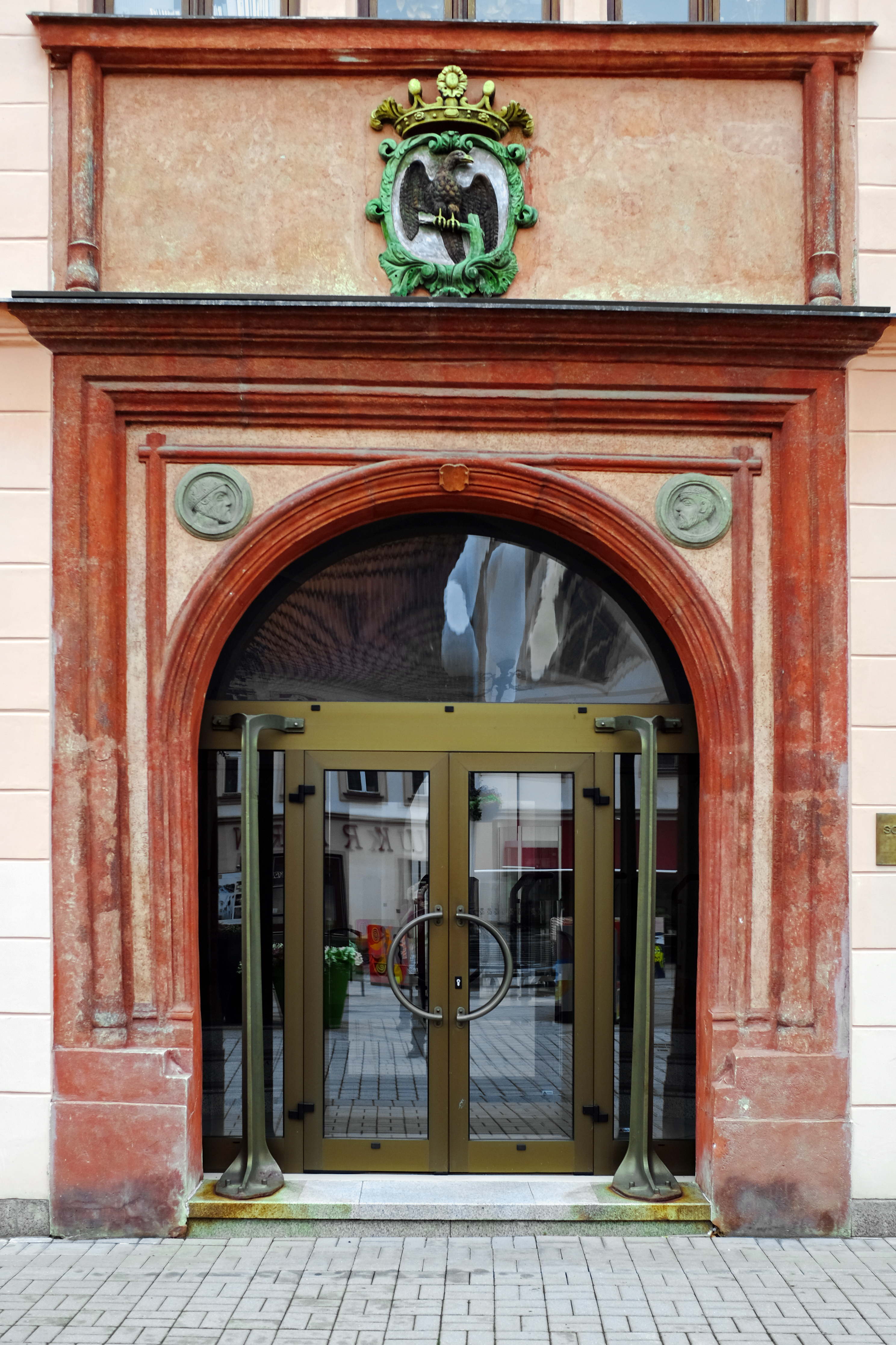 Radnice, Staré náměstí 69, Sokolov.